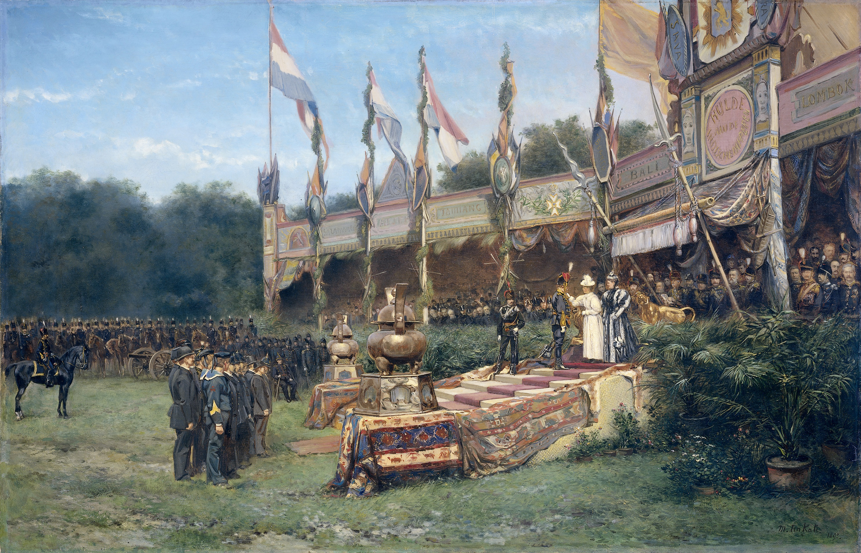 Uitreiking van het Lombokkruis door Koningin Wilhelmina op het Malieveld in Den Haag, 6 juli 1895. Rechts de grote stellage met de koningin, Emma, en alle hoogwaardigheidsbekleders en gasten. Links op het veld staan de degenen die onderscheiden worden, op de achtergrond cavalerie.